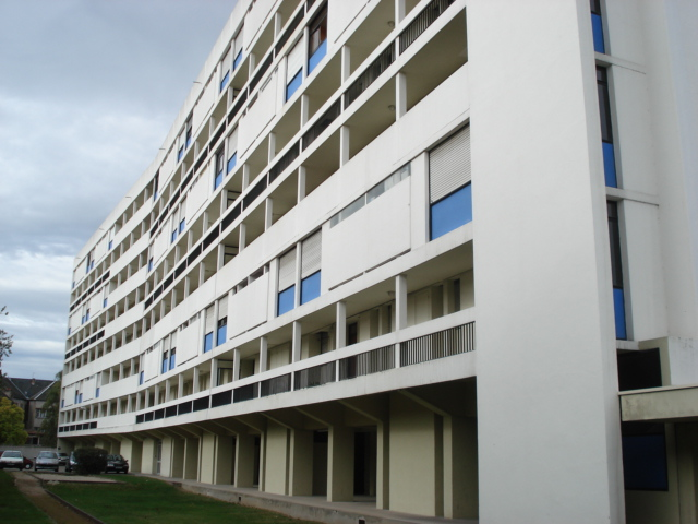 Résidence du Lycée, Montluçon (Allier, France) : Construite par Guy Talbourdeau, architecte, dès 1963-64. Terminée en 1971. Rare résidence moderniste d'esprit corbuséen : appartements en duplex, sur pilotis, toit jardin.